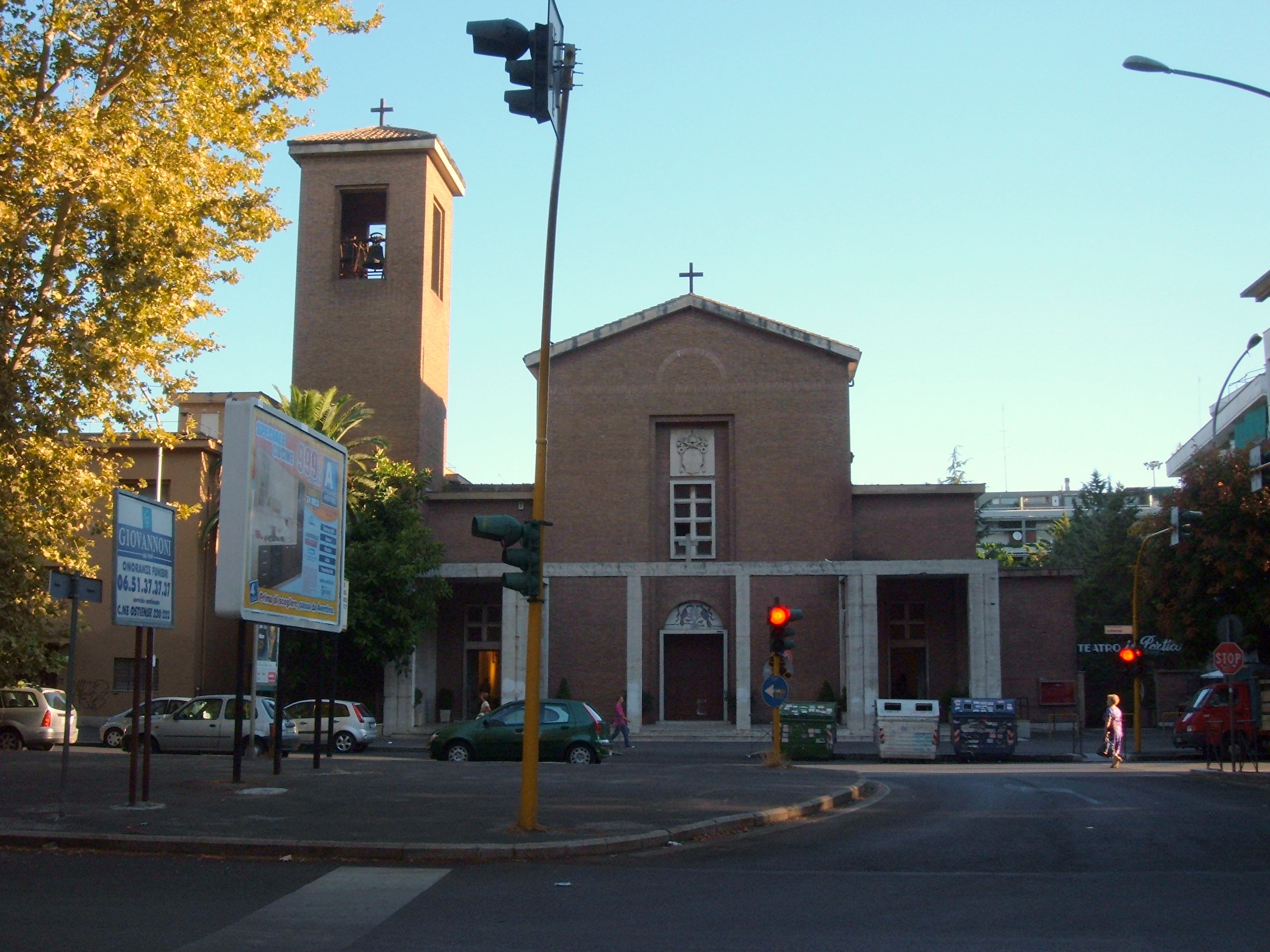 Chiesa di Santa Galla, a Roma, nel quartiere Ostiense, in circonvallazione Ostiense.